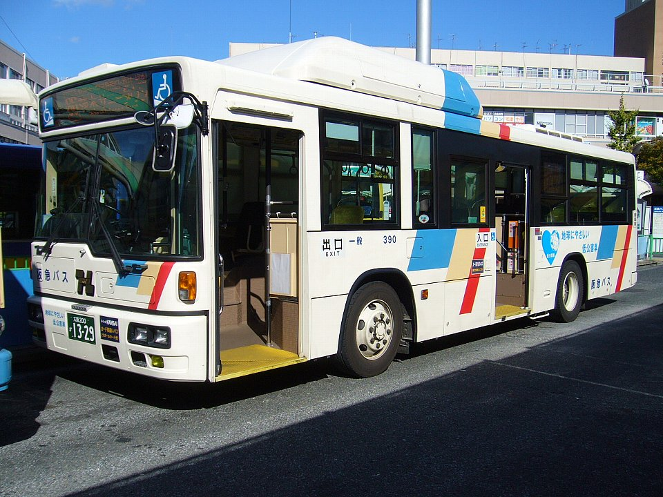 阪急バス ノンステップ車 茨木市駅西口にて